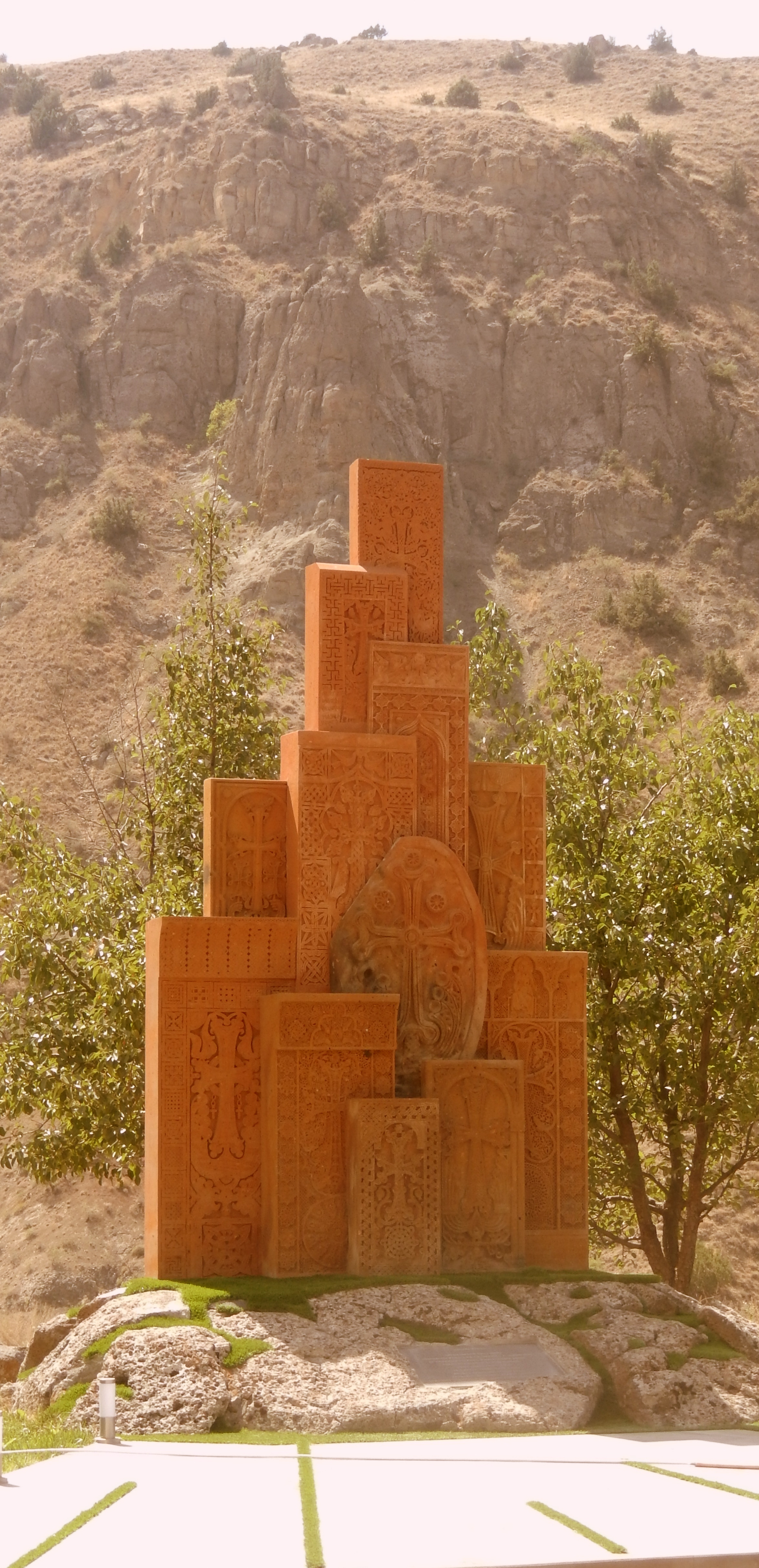 Հարություն խաչքար-հուշակոթող